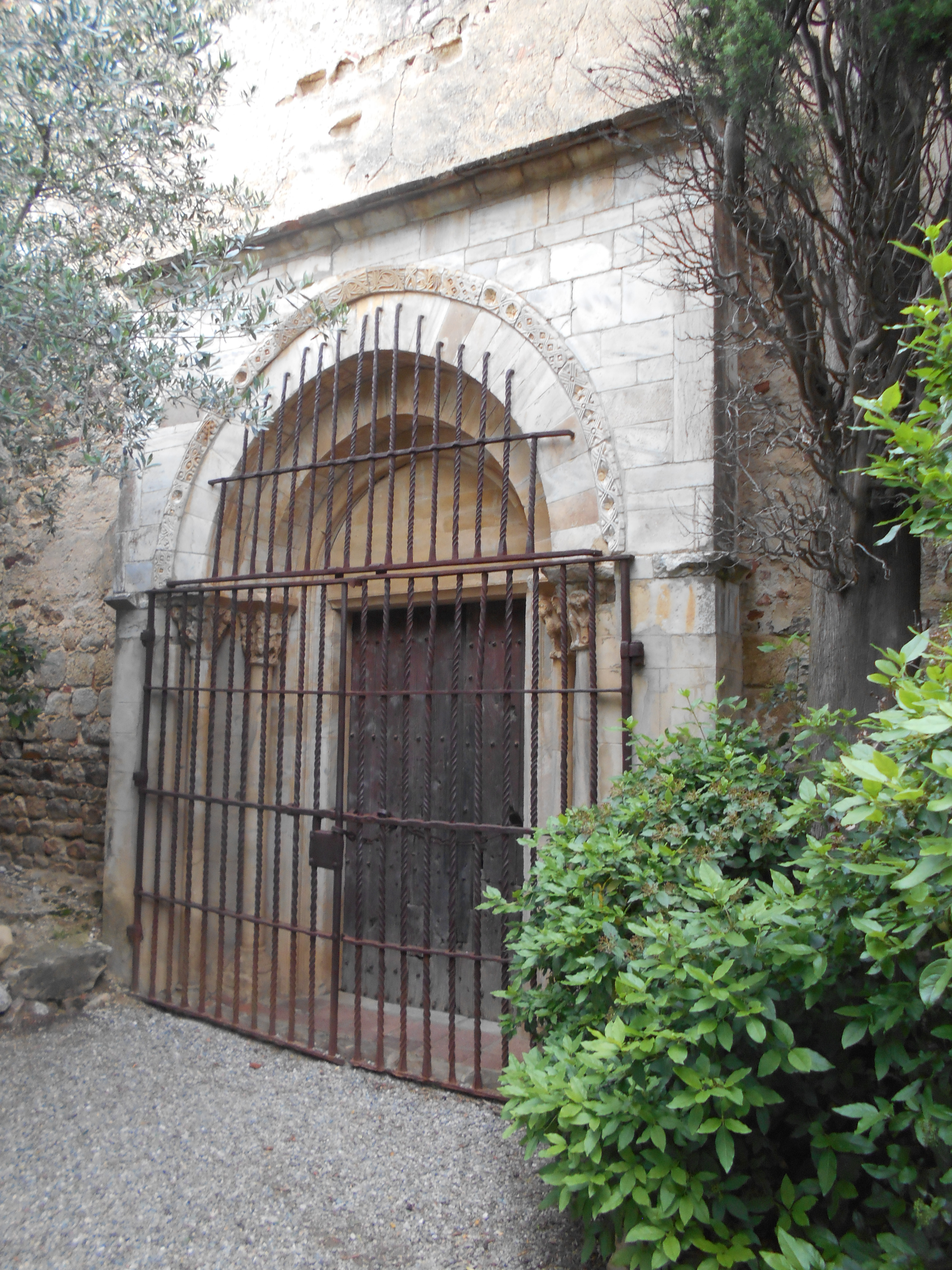 Portalada romànica del Monestir del Camp